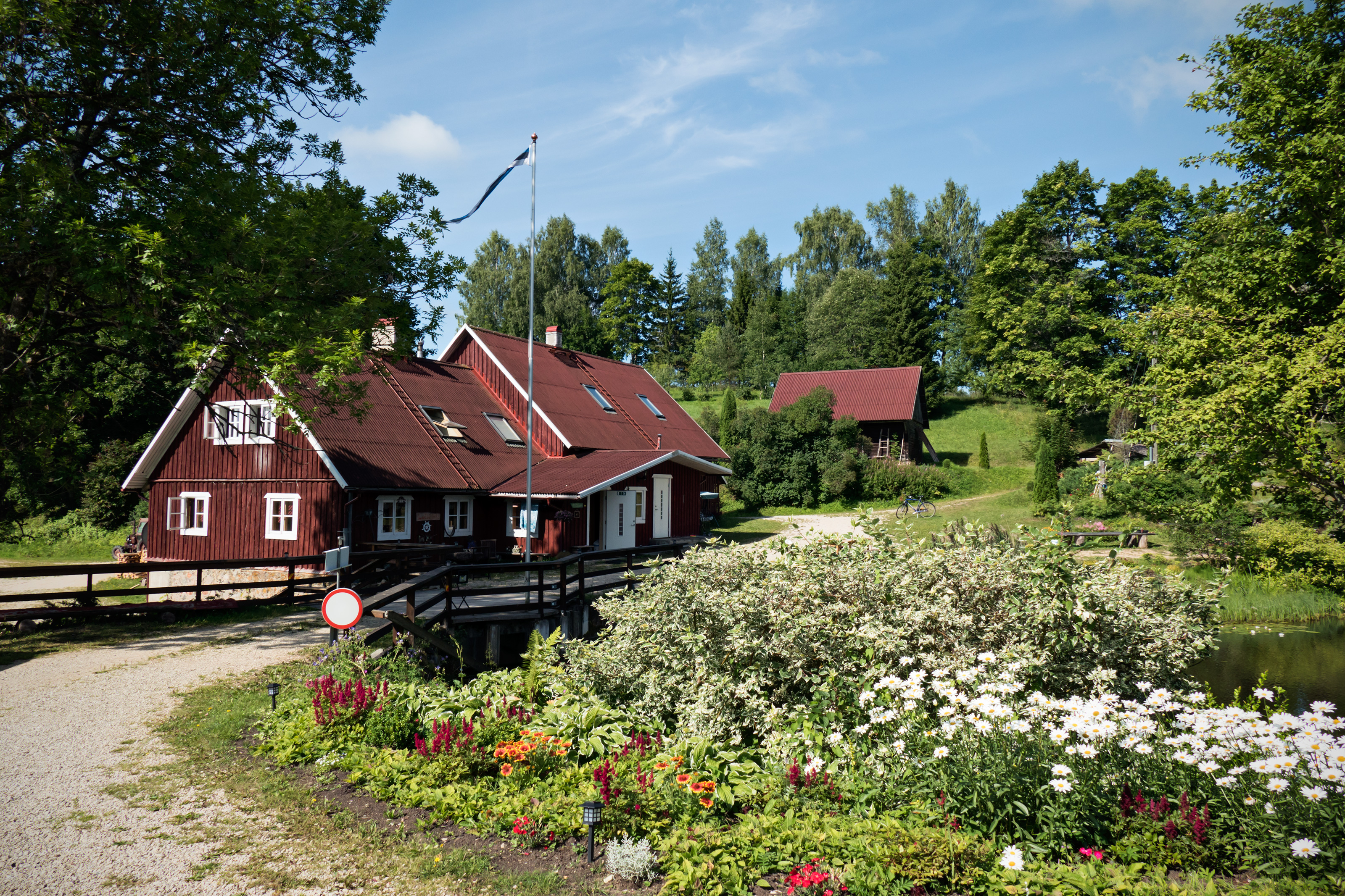 Lutsu turismitalu Arula külas Otepää vallas.